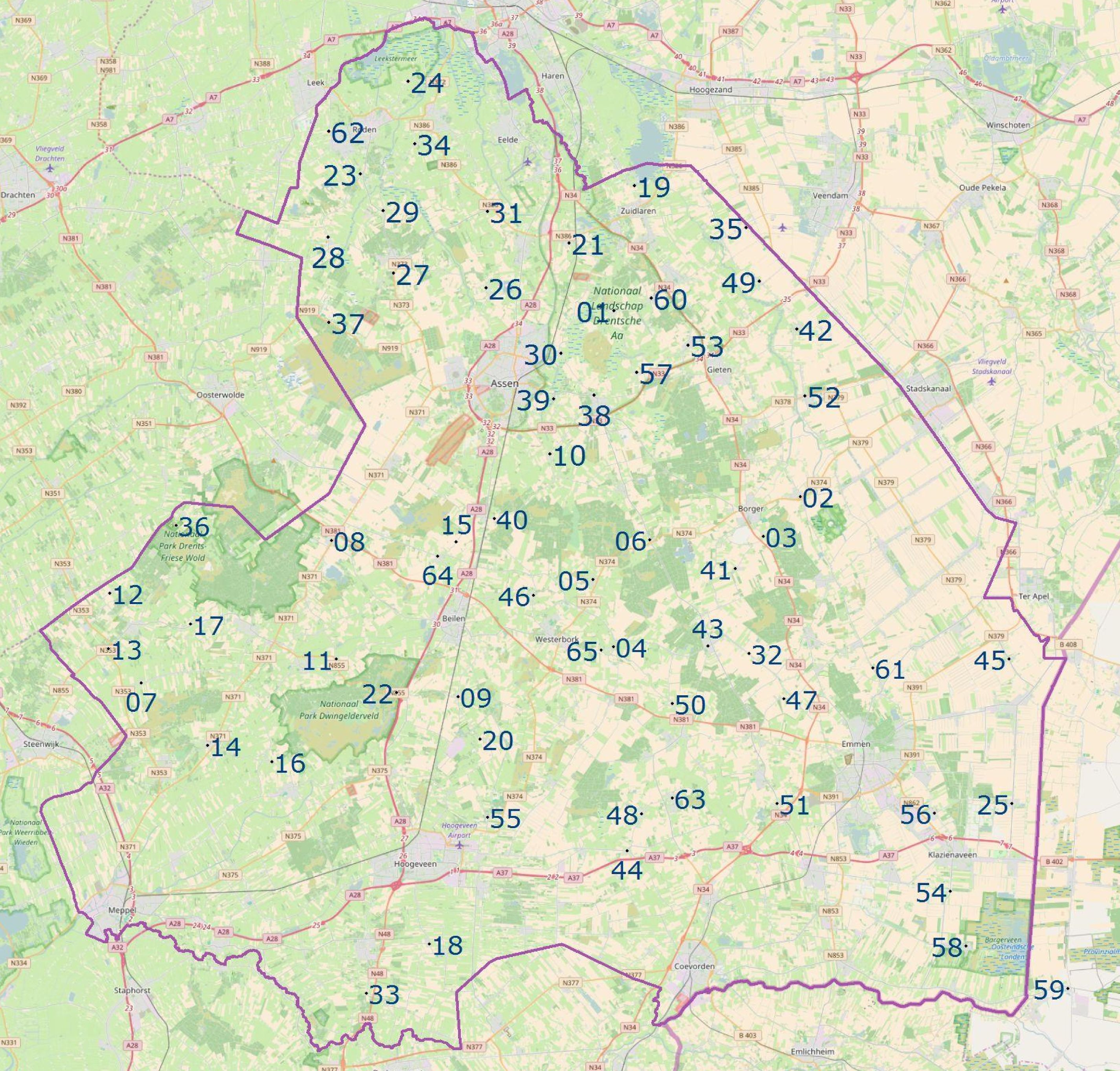 Op deze kaart staan alle Knapzakroutes in Drenthe die tot op heden zijn ontwikkeld en uitgegeven.